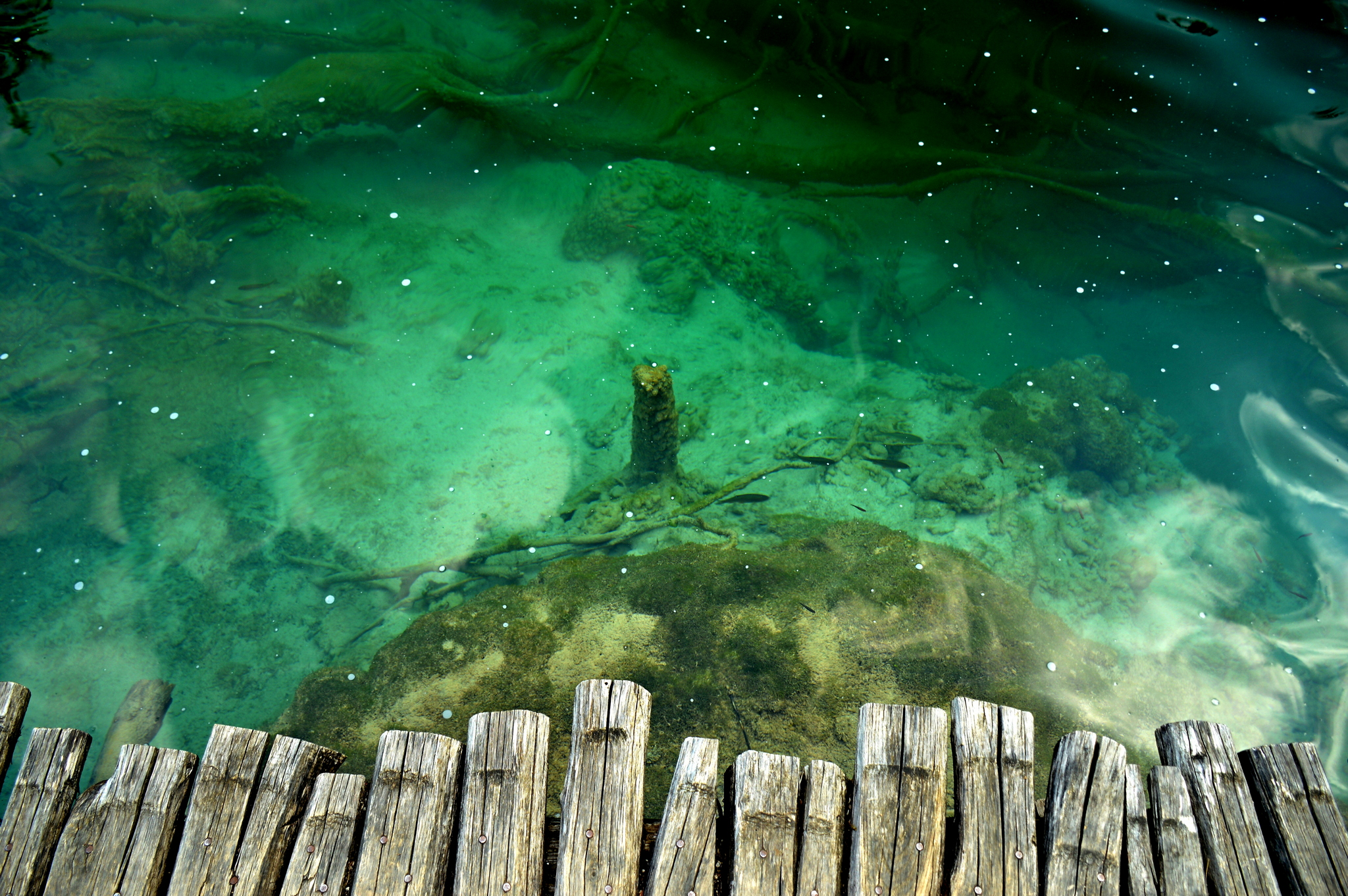 pogled sa staze u jezero na Plitvicama